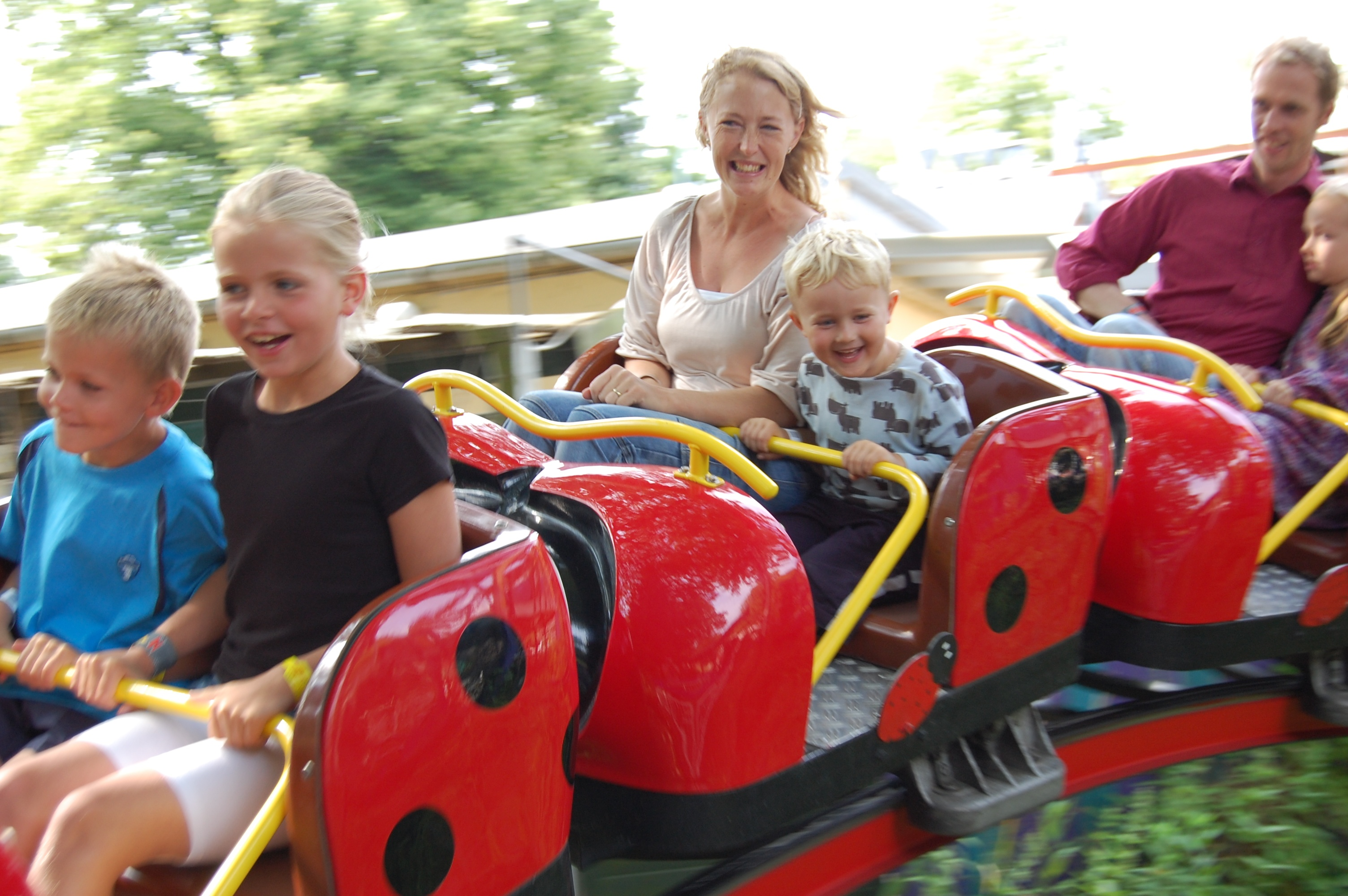 Malin och Kalle i "Mariehønen", Dyrehavsbakken, Danmark